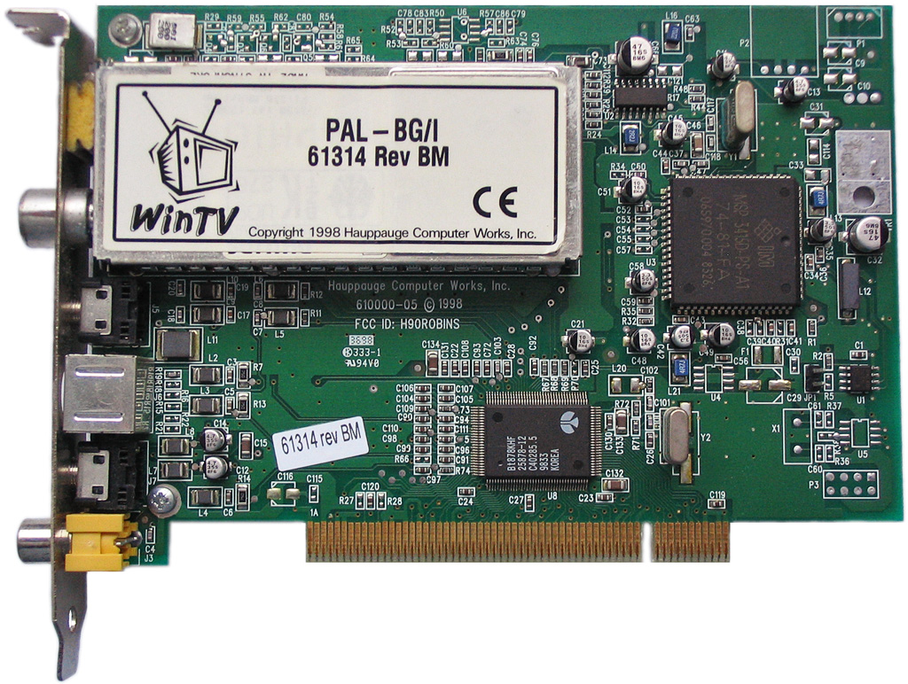 Beschreibung: Hauppauge Win TV-Karte Fotograf: Darkone, 5. Dezember 2004